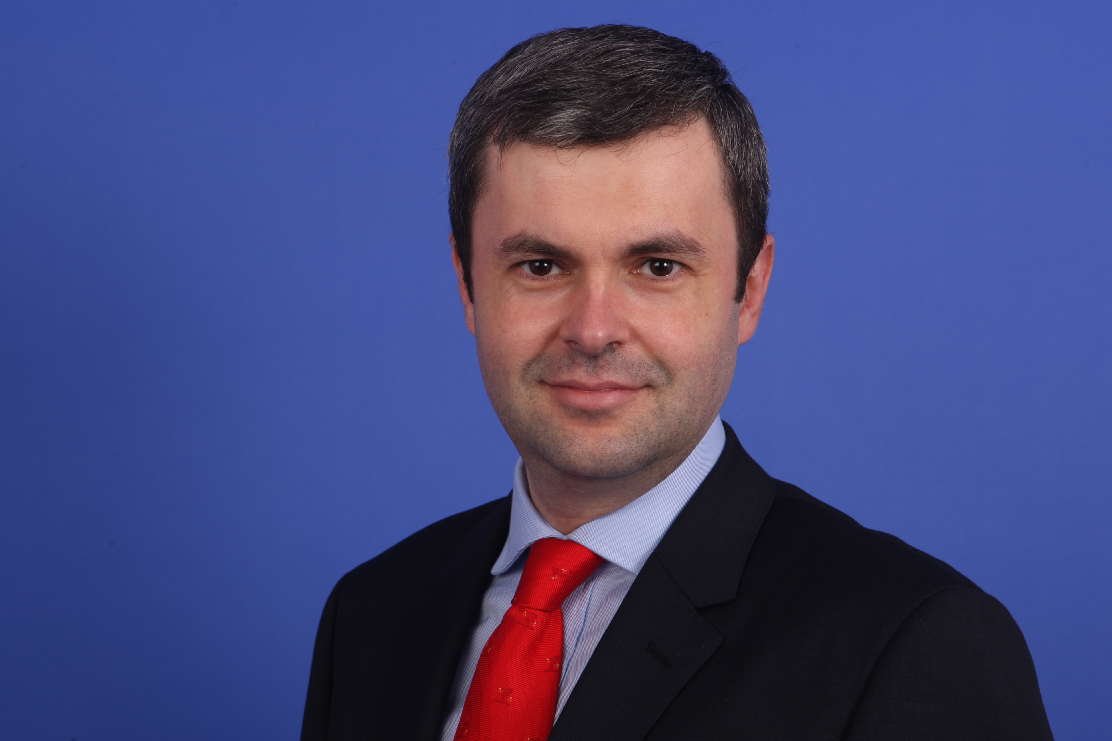 Sorin Moisă, deputat în Parlamentul European